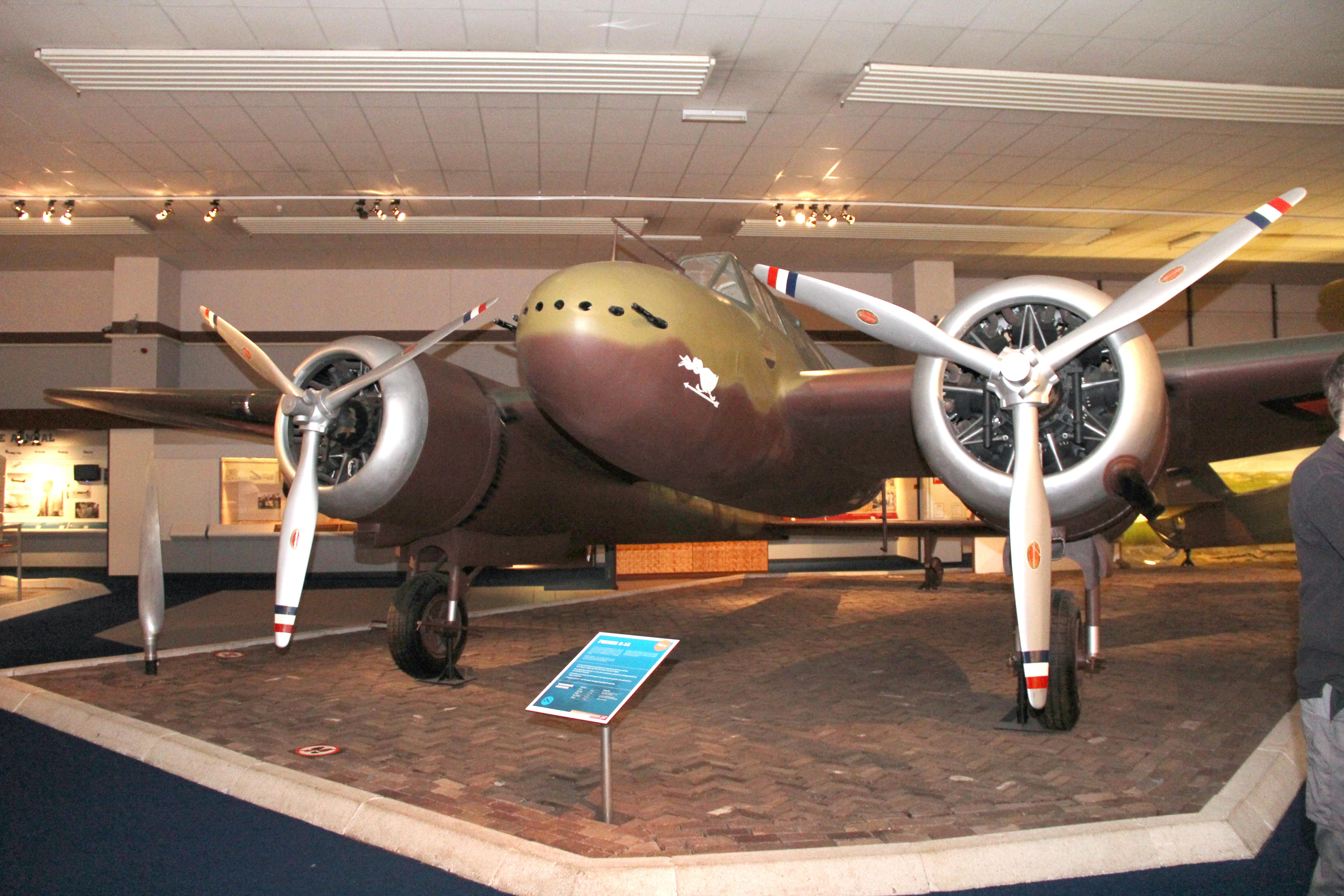 Fokker G-1A